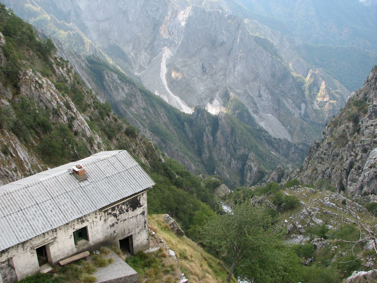 Vista verso la vallata di Renara, Alpi Apuane - Italia.